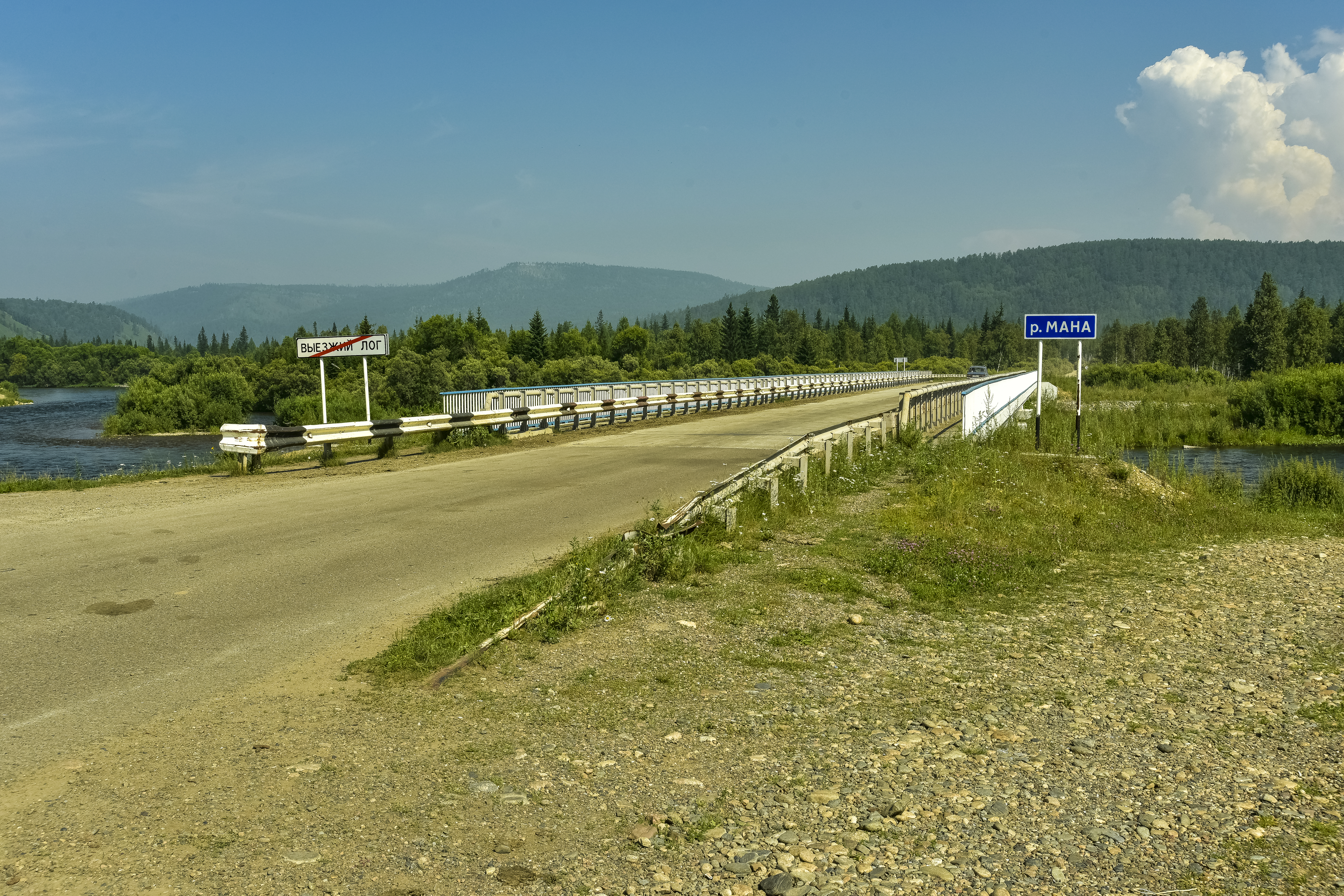 село Выезжий Лог, Красноярского края, река Мана, место съёмки эпизодов фильма "Хозяин тайги"